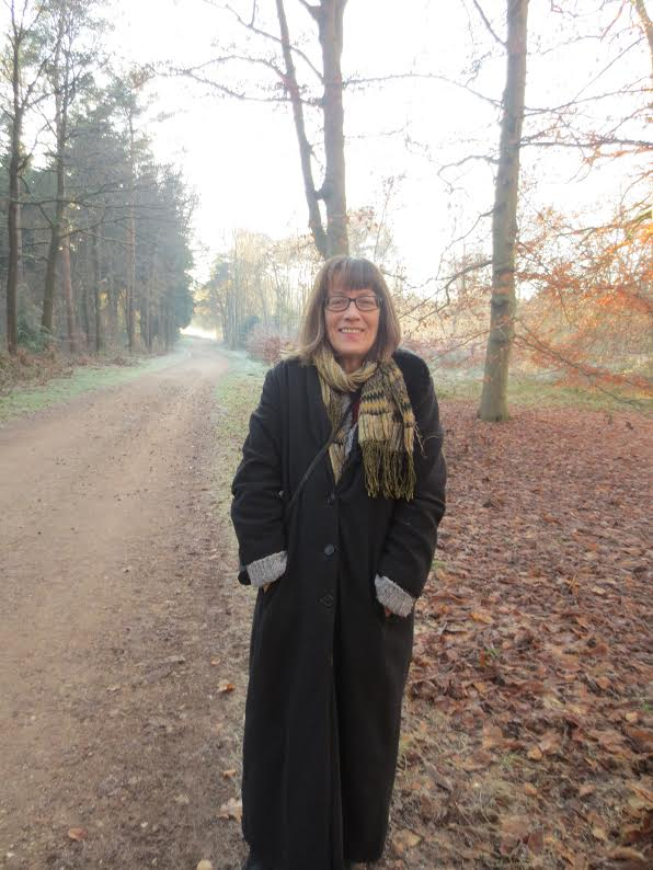 boswandeling Soest, 2017